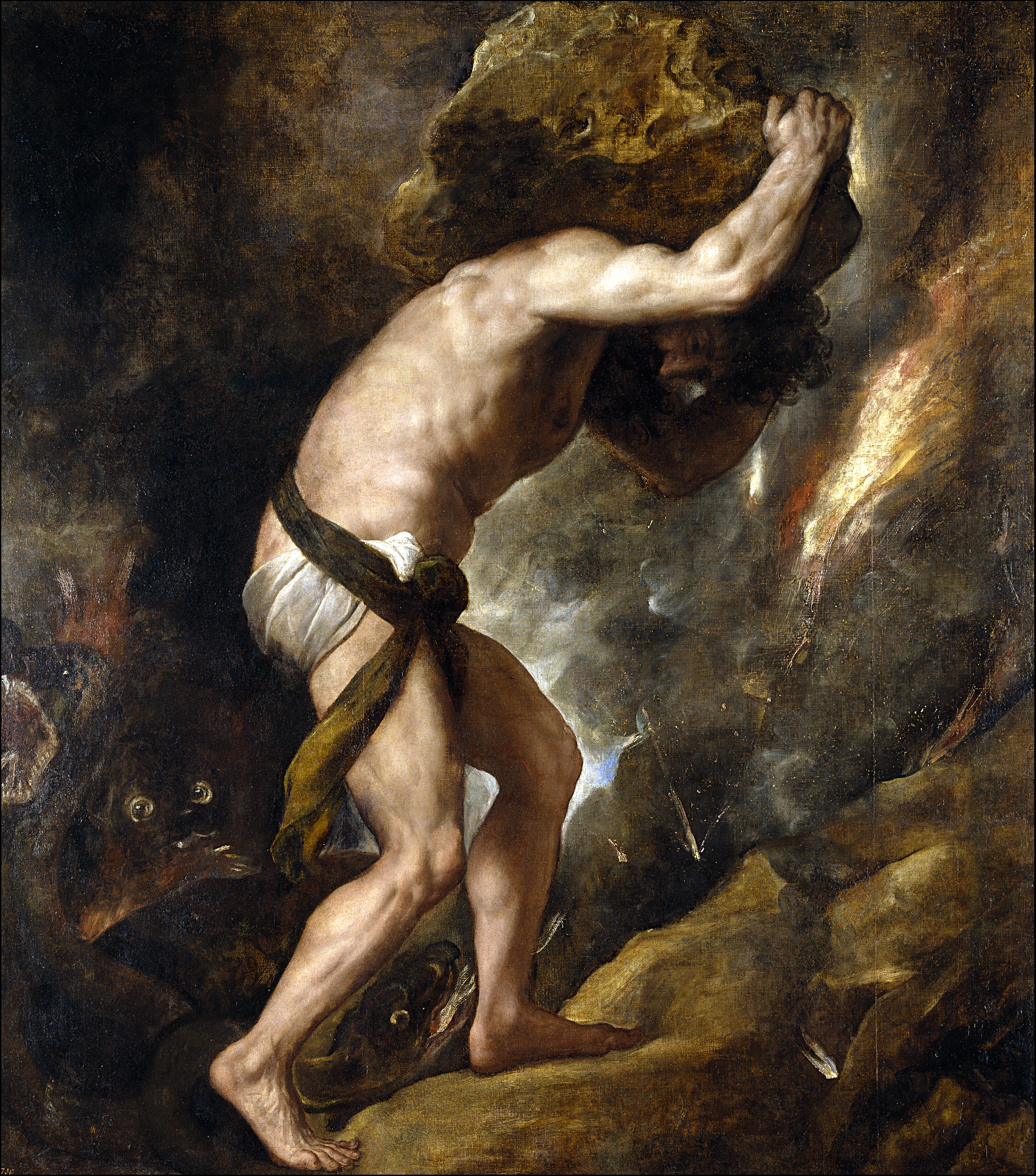 La obra representa a Sísifo, rey de Éfira y condenado por Zeus a hacer rodar con su cabeza y empujando una gran roca cuesta arriba, que continuamente se precipitaba hacia abajo, por haber revelado que Zeus había secuestrado a Egina.